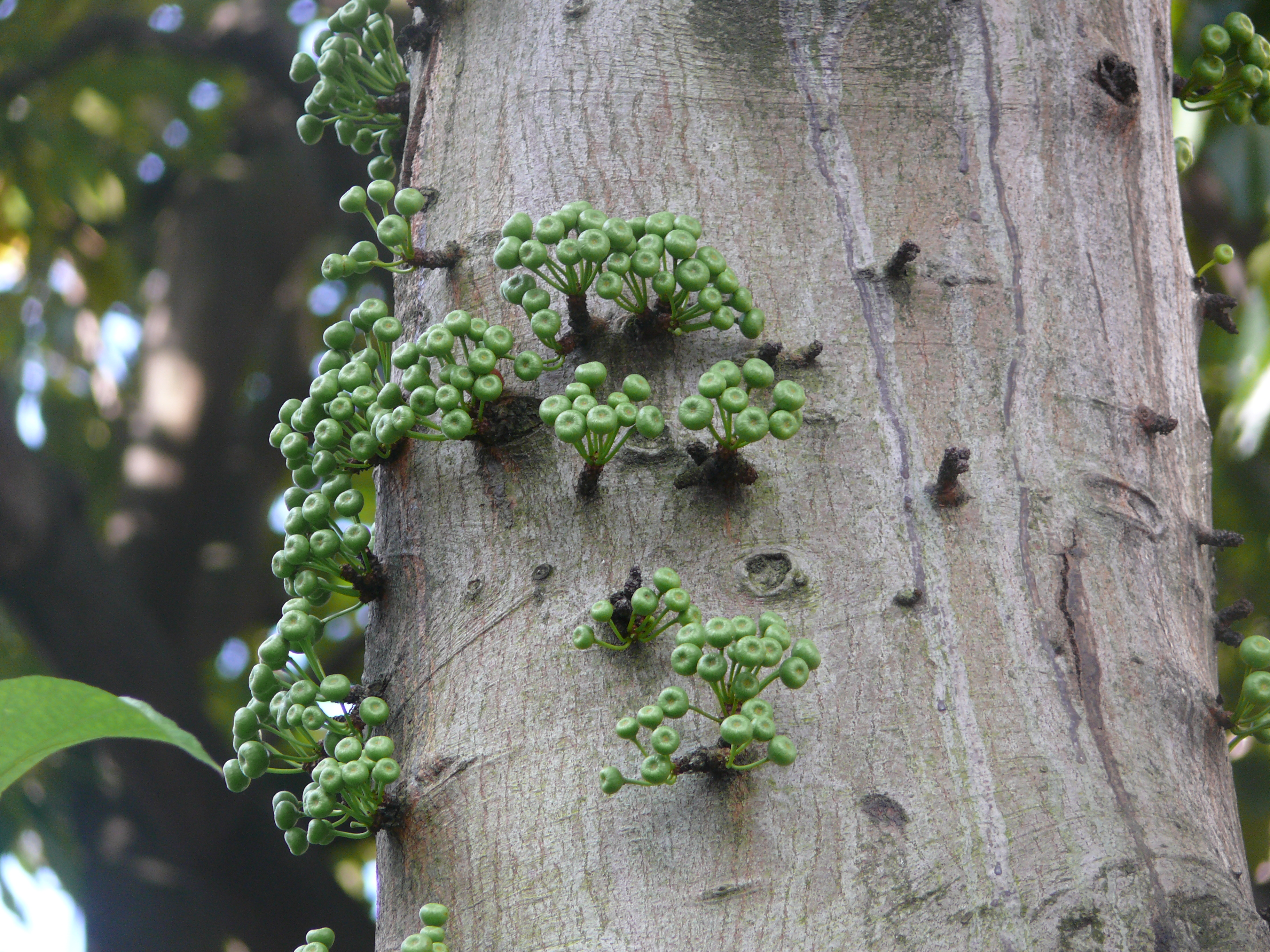 Ficus variegata found in Hong Kong. Photo taken in Hong Kong.